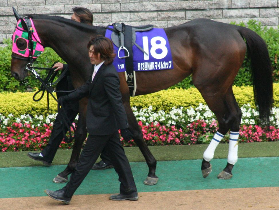 ダンツキッスイ（東京競馬場）